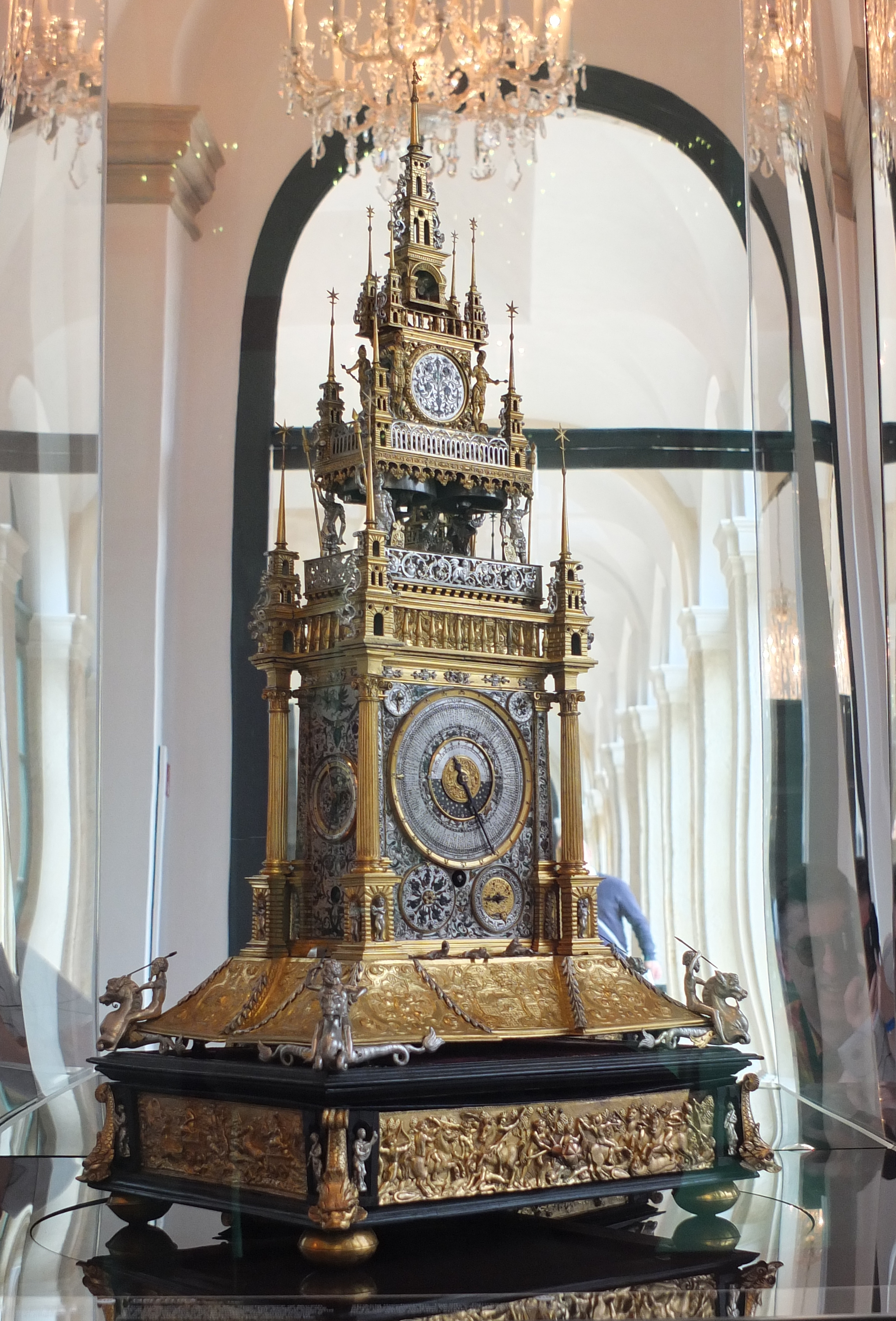 Deze tafelklok uit 1587 is het meesterwerk van de Neurenbergse klokkenmaker Paulus Schuster. De grote wijzerplaat aan de ene kant duidt het uur aan en is tevens een astrolabium, die aan de andere is een jaarkalender; De kliene wijzerplaten toont de dag van d eweek, het kwartier en minuut en dient ook als wekker. De zilveren figuren van Neptunus bewegen achtereenvolgens hun hoofd voor 15 seconden. De haan bovenaan kraait elk uur terwijl twee mannen op de klok slaan.